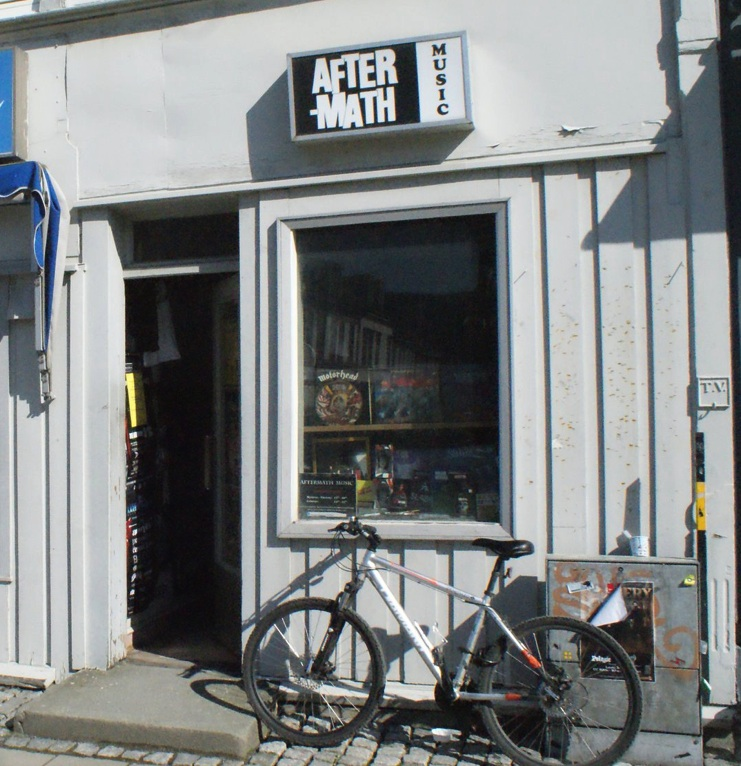 Aftermath Music rundt 2010/2011